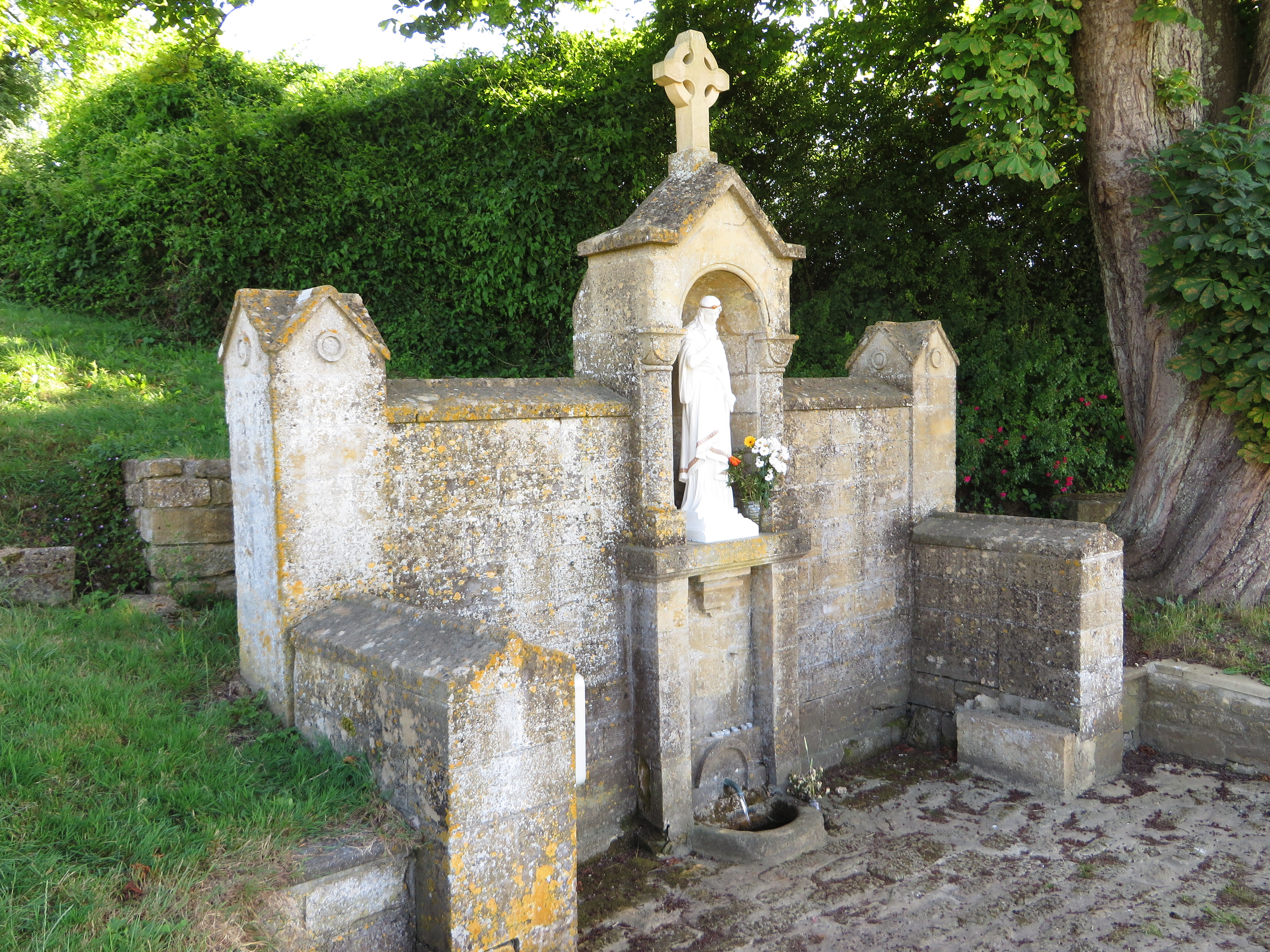 Villécloye La source miraculeuse